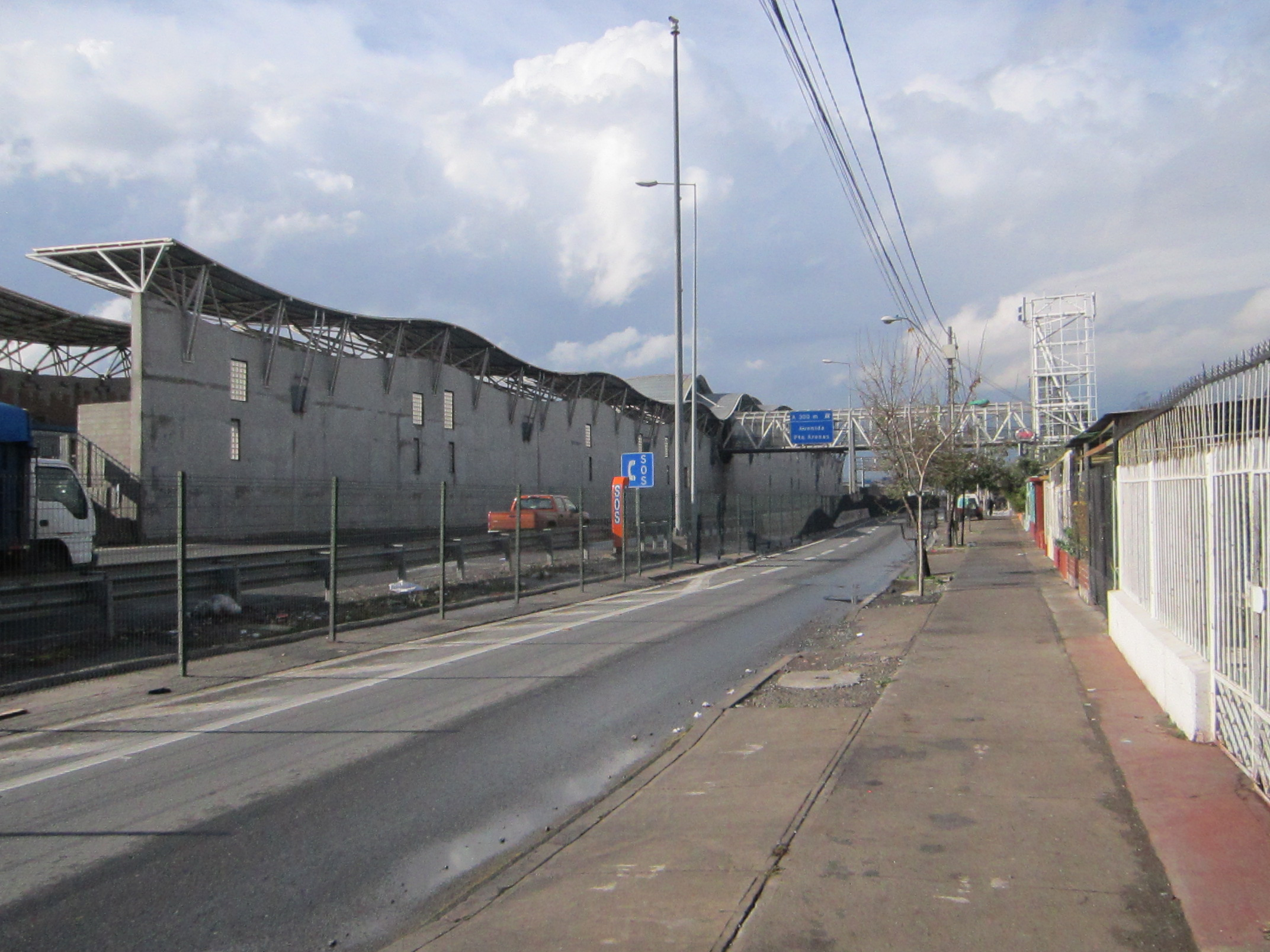 Vista exterior de la Estación La Granja de la Línea 4A del Metro de Santiago.